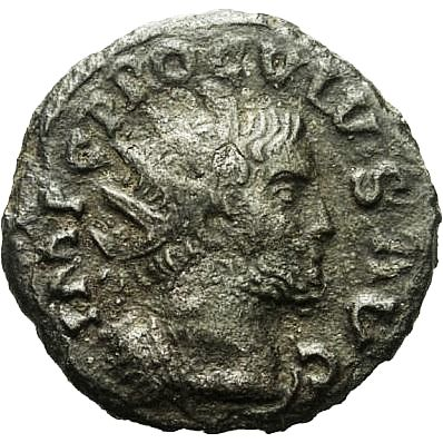 IMP C PROCVLVS AVG, gepanzerte Büste mit Strahlenkrone nach rechts. Zweites bekanntes Exemplar. Ex Dix Noonan Webb, Auktion 10.4.2013, Nr. 694. Die Münze wurde am 7.11.2012 von Mark Hildreth und Colin Popplewell in einem Feld in der Nähe von Stamford Bridge in East Yorkshire/England gefunden.